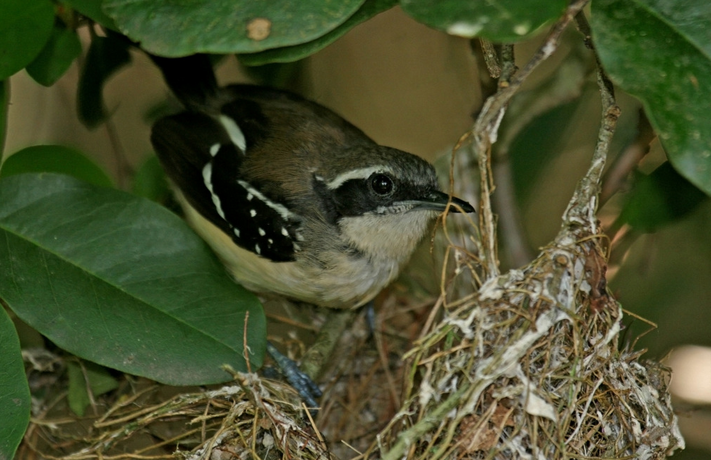 Exemplar adulto fêmea de Formicivora littoralis (now considered as subspecies of Formicivora serrana), foto realizada pelo Prof. Sávio Freire Bruno; em caso de uso, somente creditando-a e que a licença da obra originada seja sob Creative Commons. Espécie criticamente em perigo de extinção.